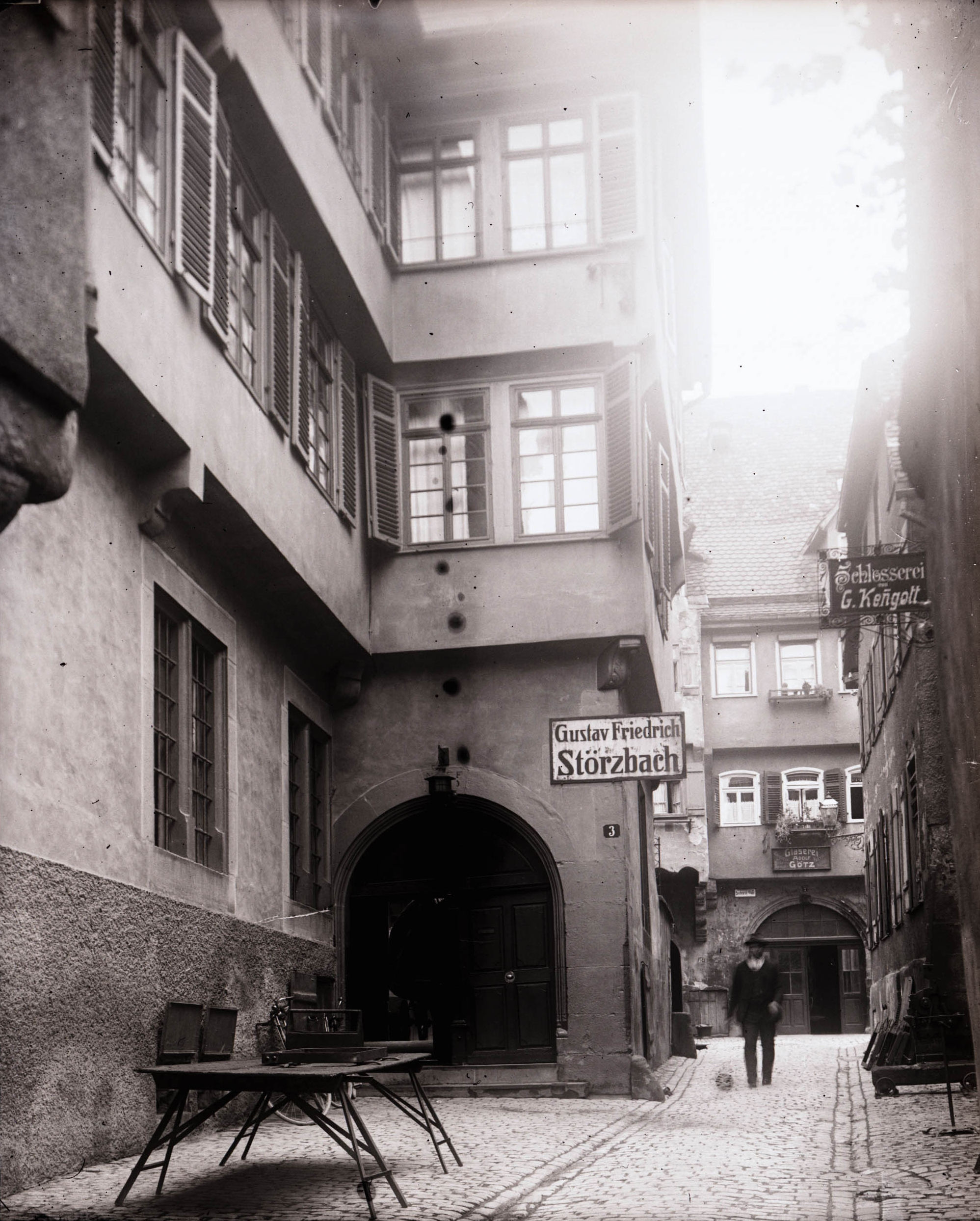 Das 1944 zerstörte Patrizierhaus in der Siebeneichgasse 3 in Heilbronn,[1] Sitz der Lebensmittel-Großhandlung Gustav Friedrich Störzbach & Co.[2]